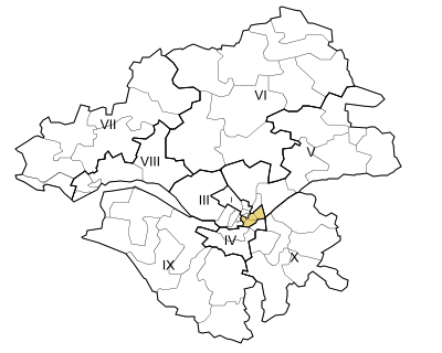 Carte de la deuxième circonscription de la Loire-Atlantique